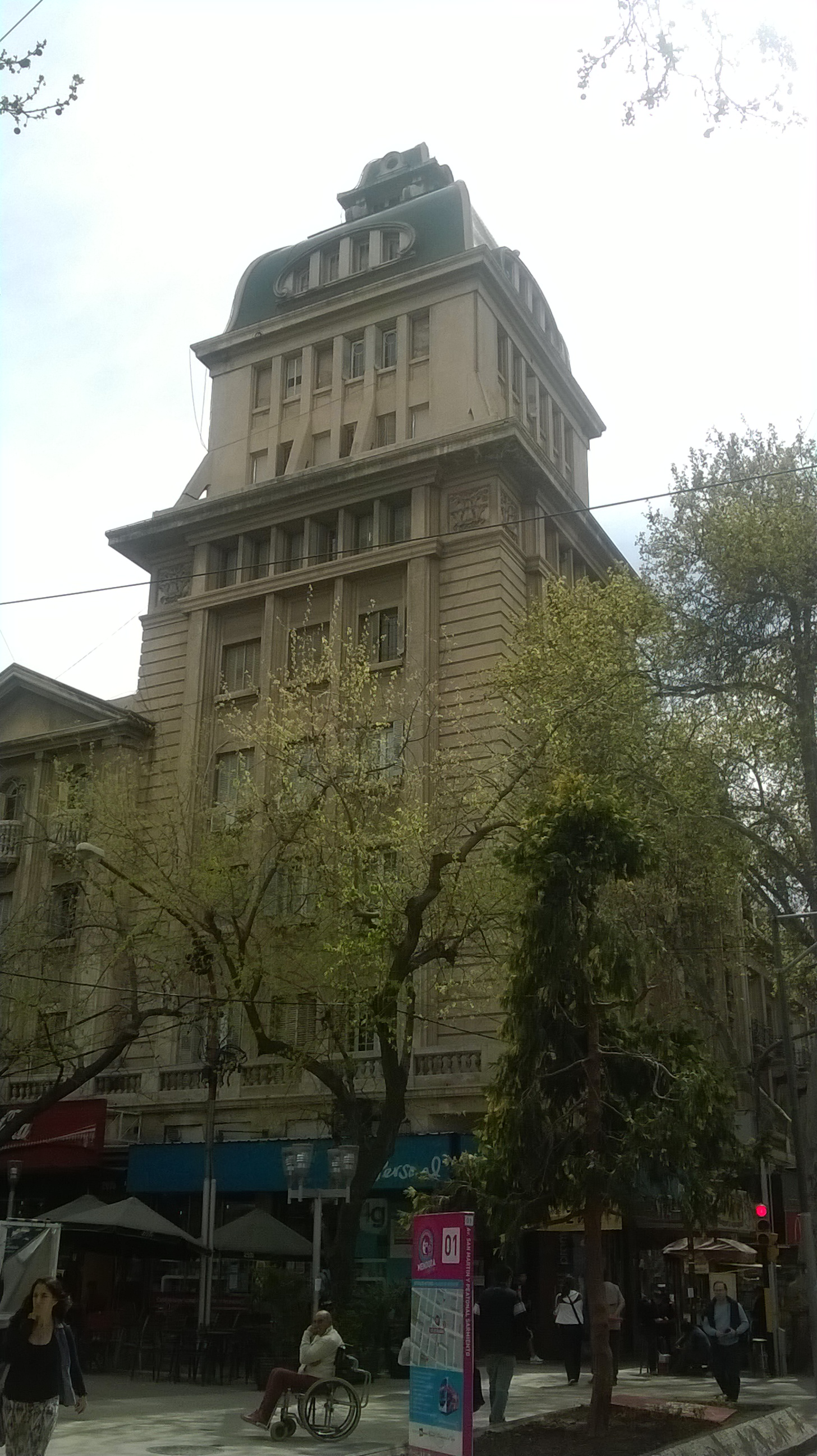 Pasaje San Martín en el 2015.